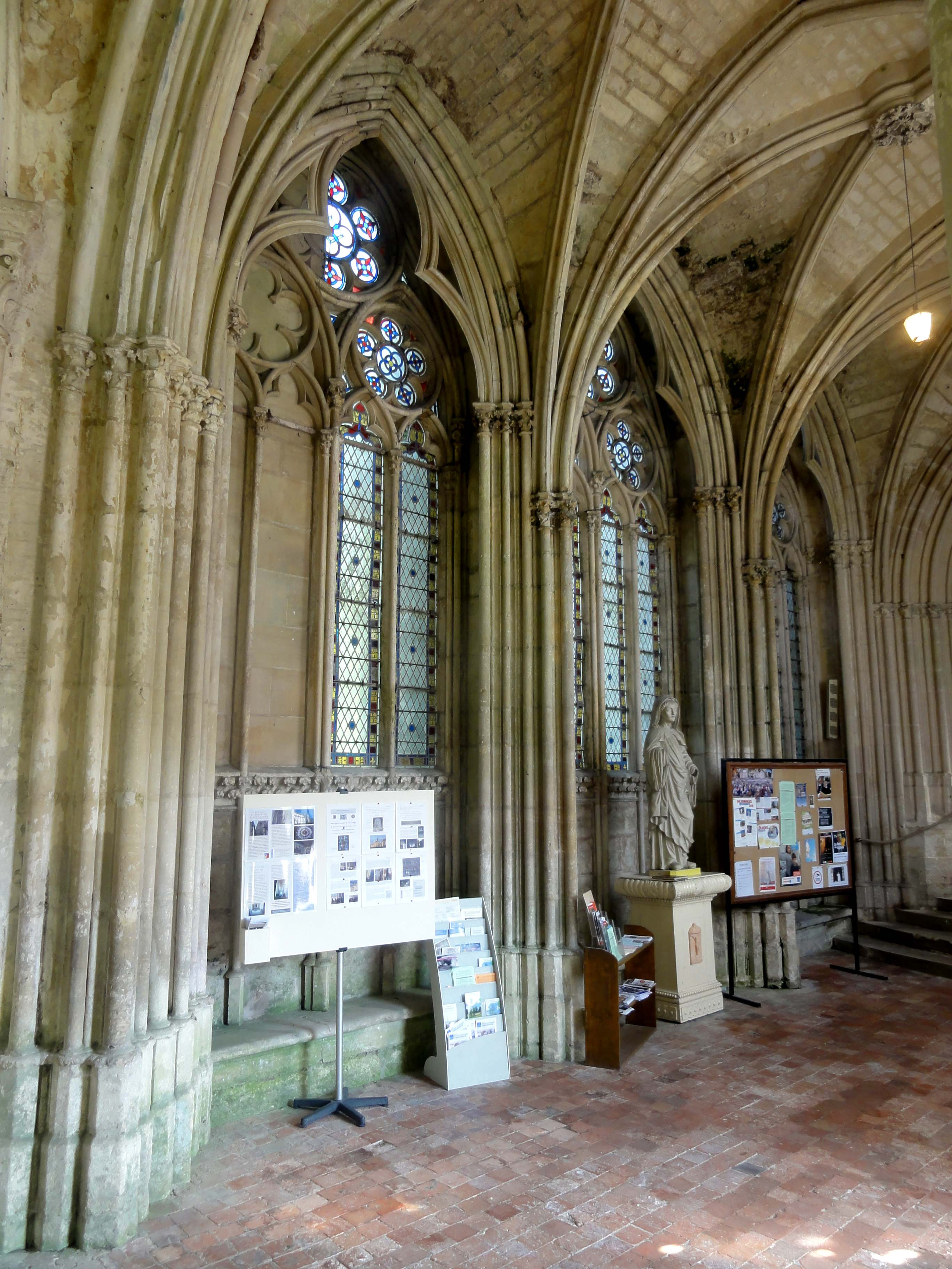 Intérieur de la chapelle de la Vierge (connue comme sainte-chapelle) - voir le titre du fichier.